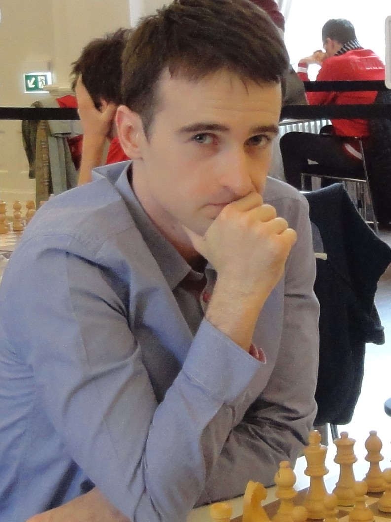 Ernesto Inarkiev, Deutsche Schachbundesliga Saison 2015/16, Runde 12 in Baden-Baden.